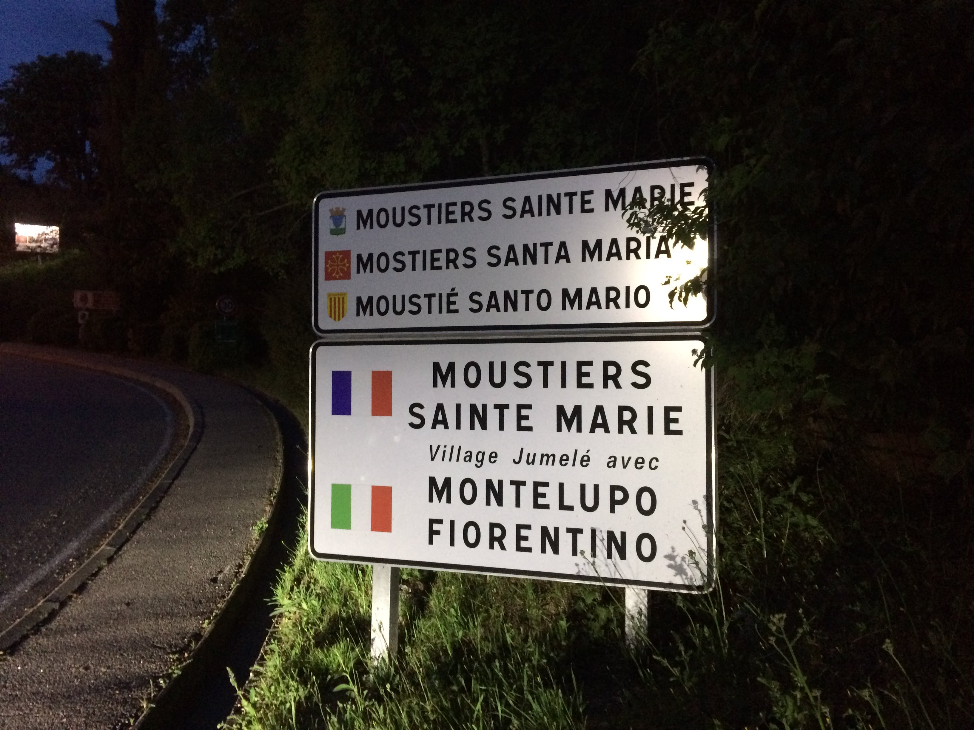 Panèl d'intrada de Mostiers Santa Maria.